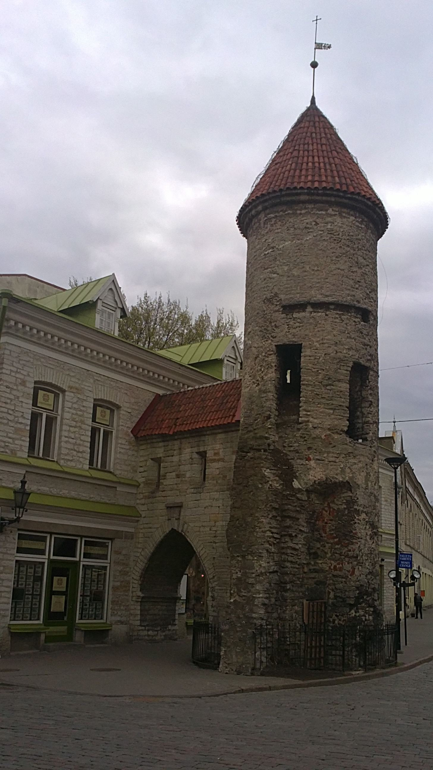 Tallinna linnamüüri Viru väravate eesvärava vasak torn, Viru tänaval